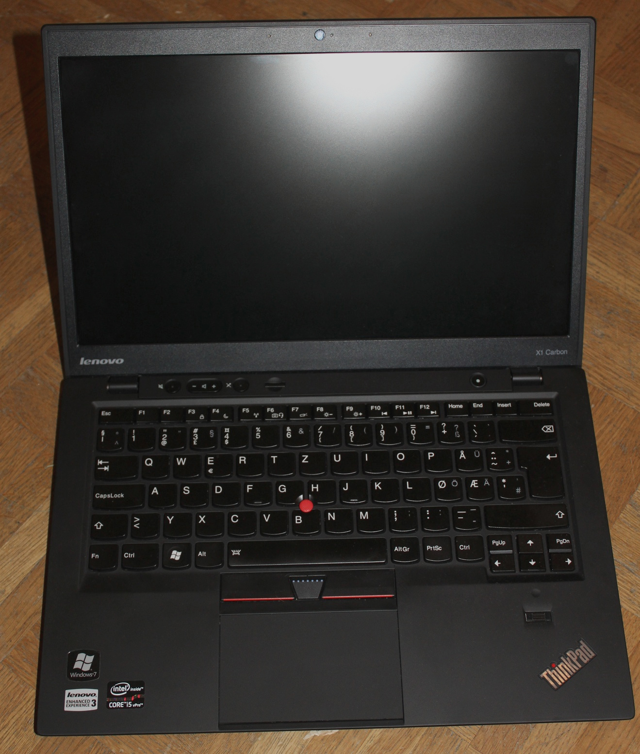 ThinkPad X1 Carbon, ein 14"-Ultrabook von Lenovo.